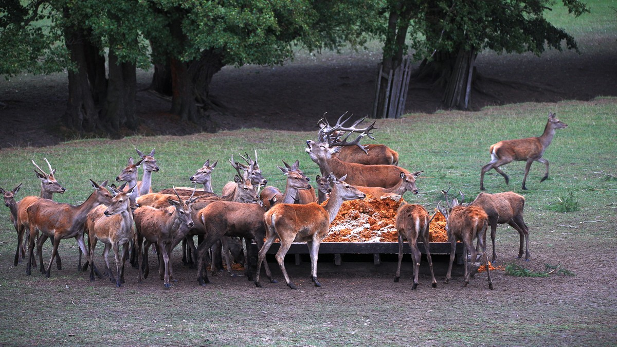 Treberzusatzfütterung von Hirschen im Wildpark Mamerow, Mecklenburg